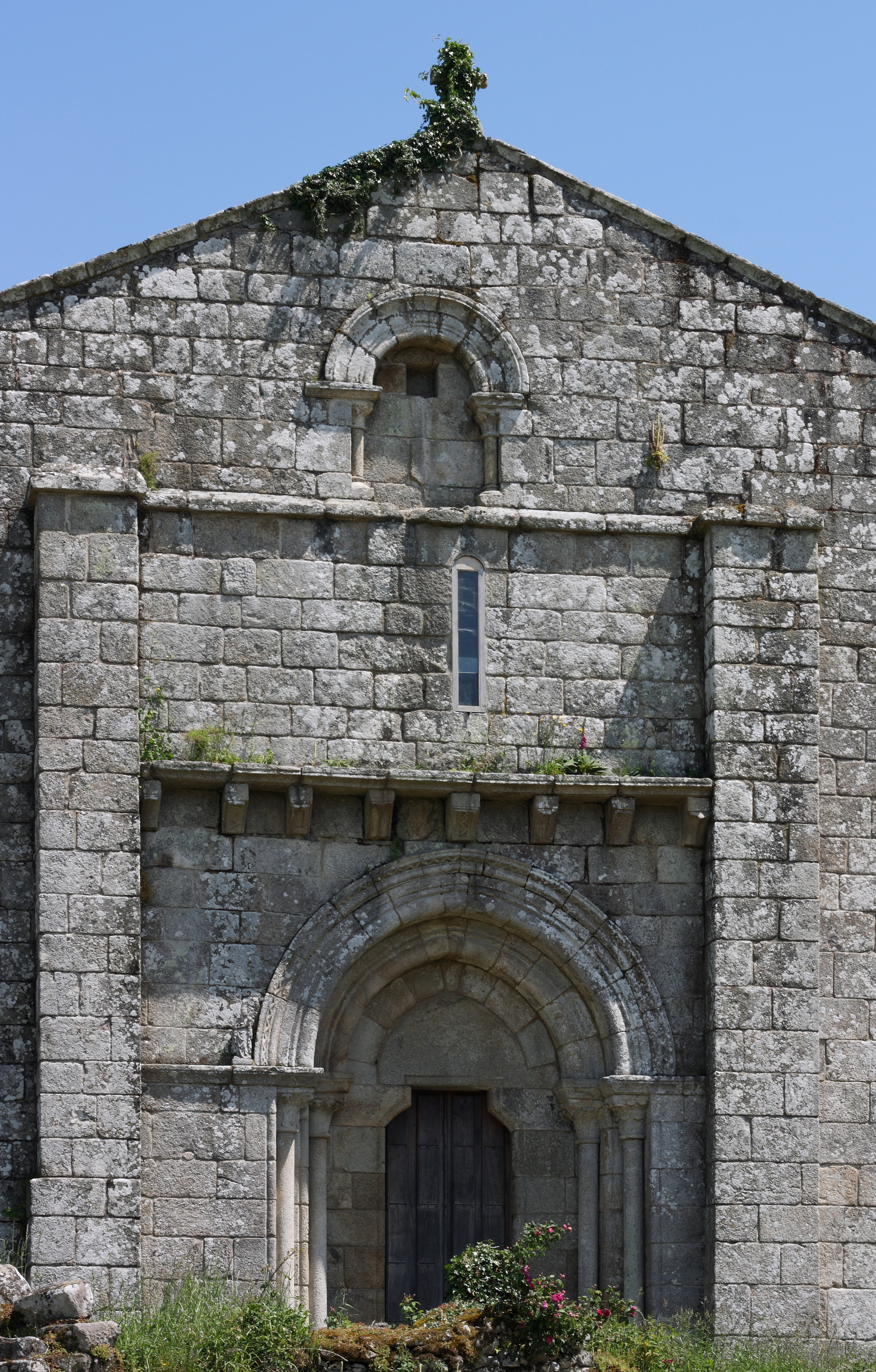 Ehemalige Klosterkirche San Pedro in Vilanova de Dozón in der Gemeinde Dozón in der spanischen Provinz Pontevedra (Galicien), Westfassade mit Archivoltenportal